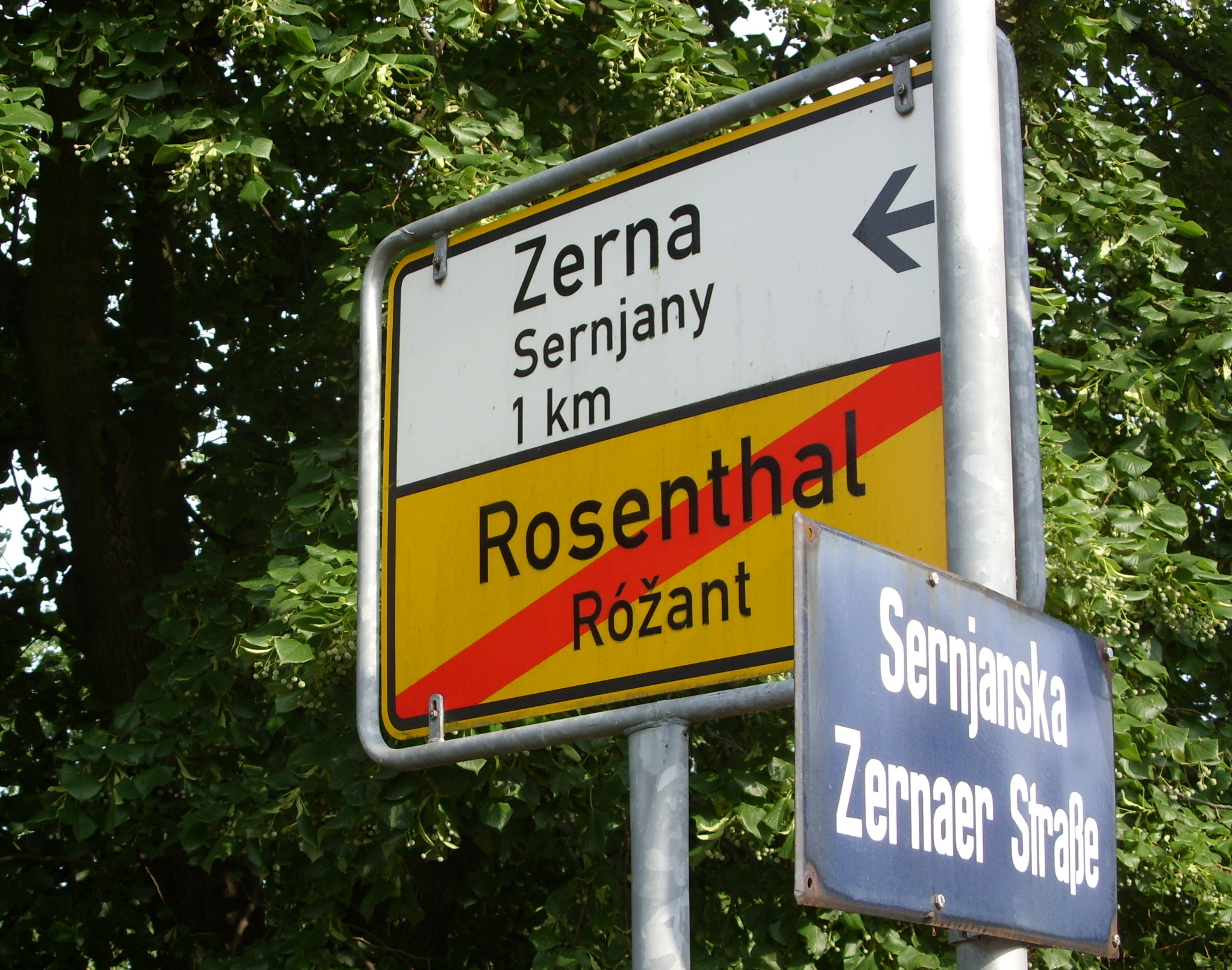 Deutsch-Sorbische Straßenschilder in Rosenthal, Landkreis Bautzen. Hornjoserbsce: Němsko-serbskej dróhowej tafličce w Róžeńće.